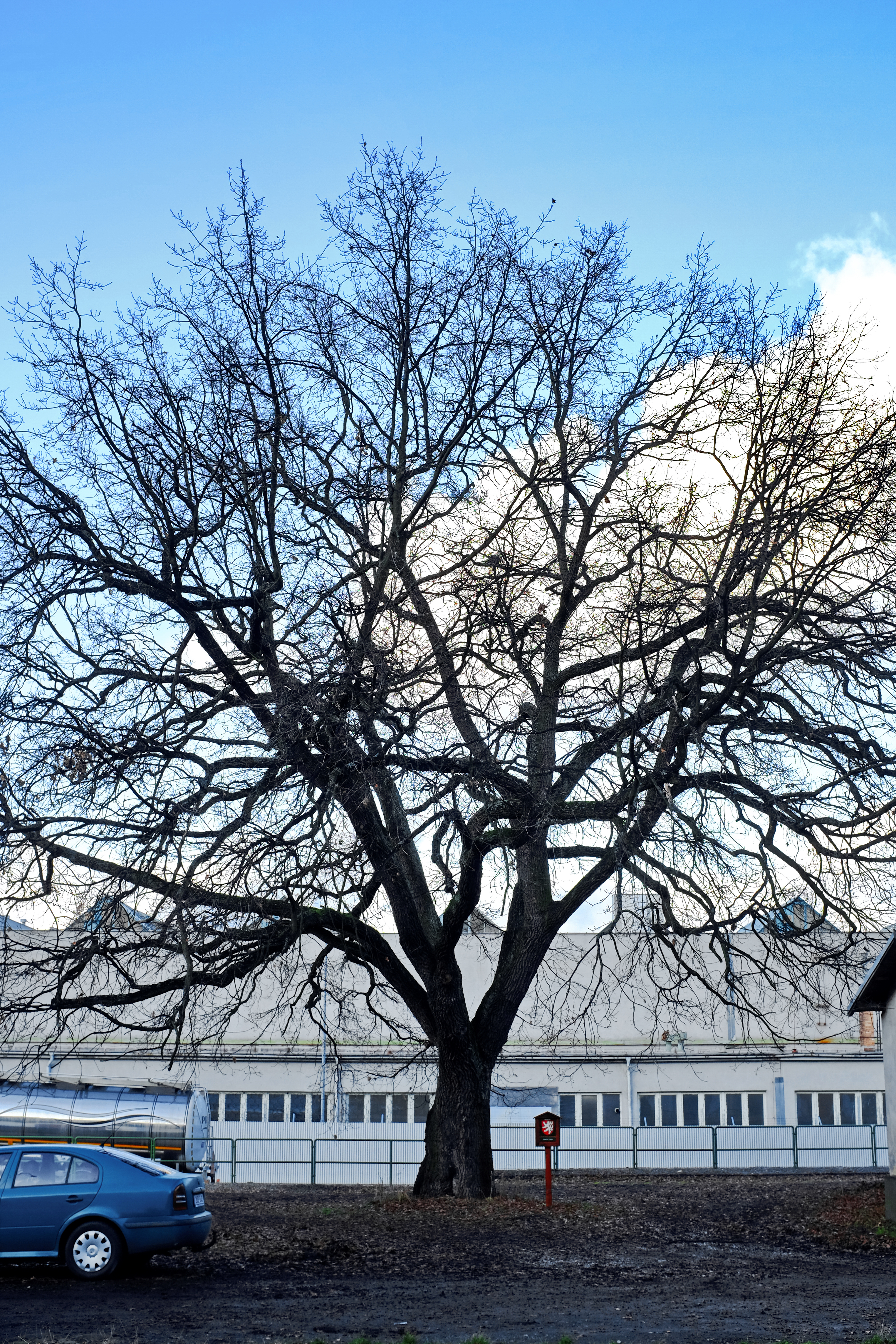 Památný strom - Dub u chemičky - Sokolov